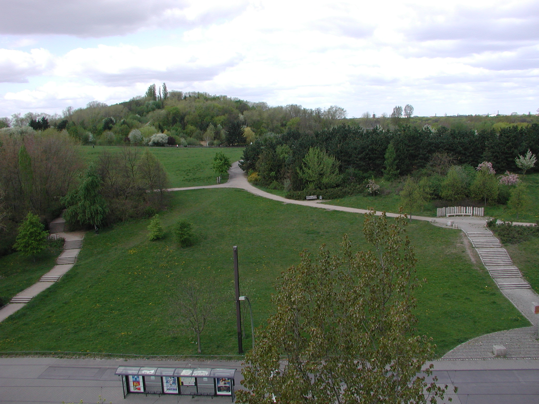 die niedrigere Kuppe im Volkspark Prenzlauer Berg